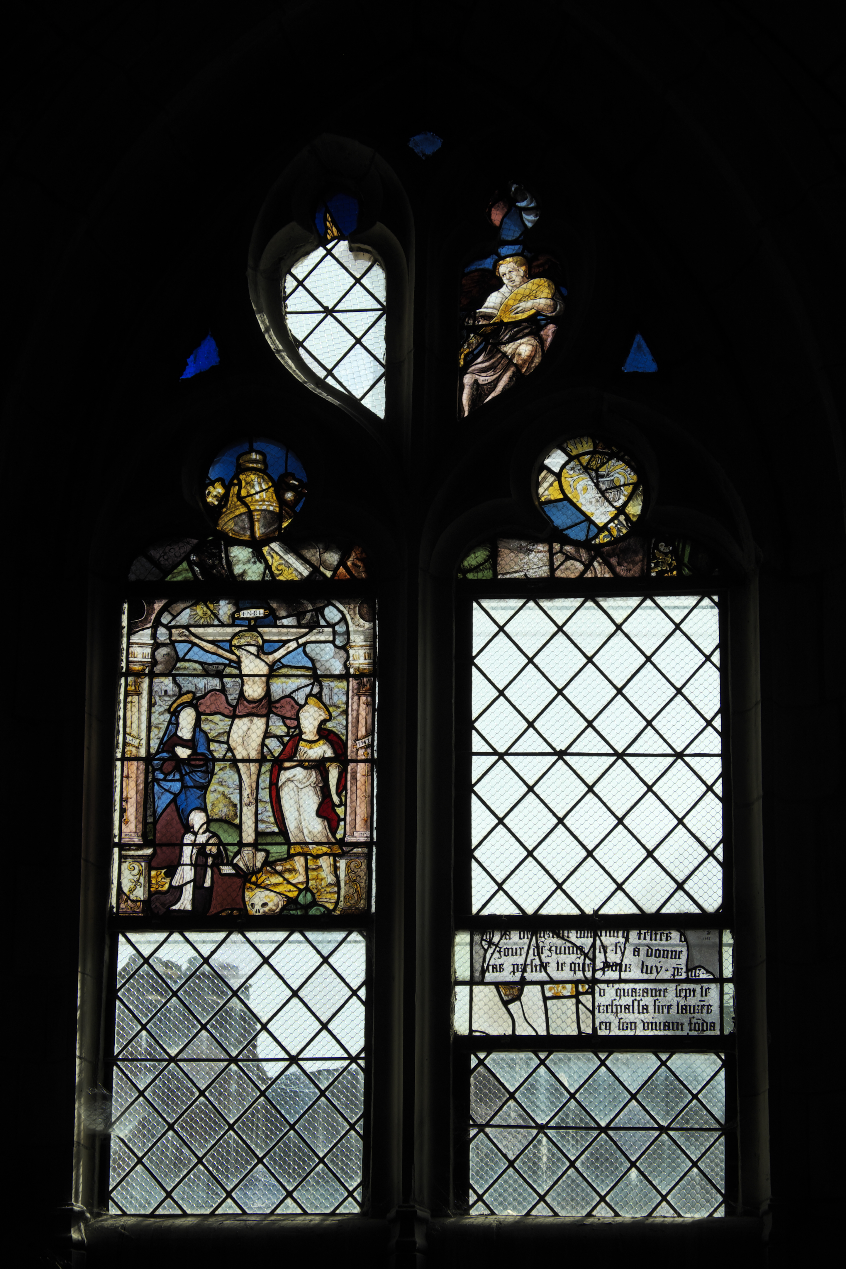 Katholische Kirche Saint-Pierre und Saint-Paul in Aumale im Département Seine-Maritime (Haute-Normandie/Frankreich), Fragmente eines Bleiglasfensters aus dem 16. Jahrhundert, Darstellung: Kreuzigung